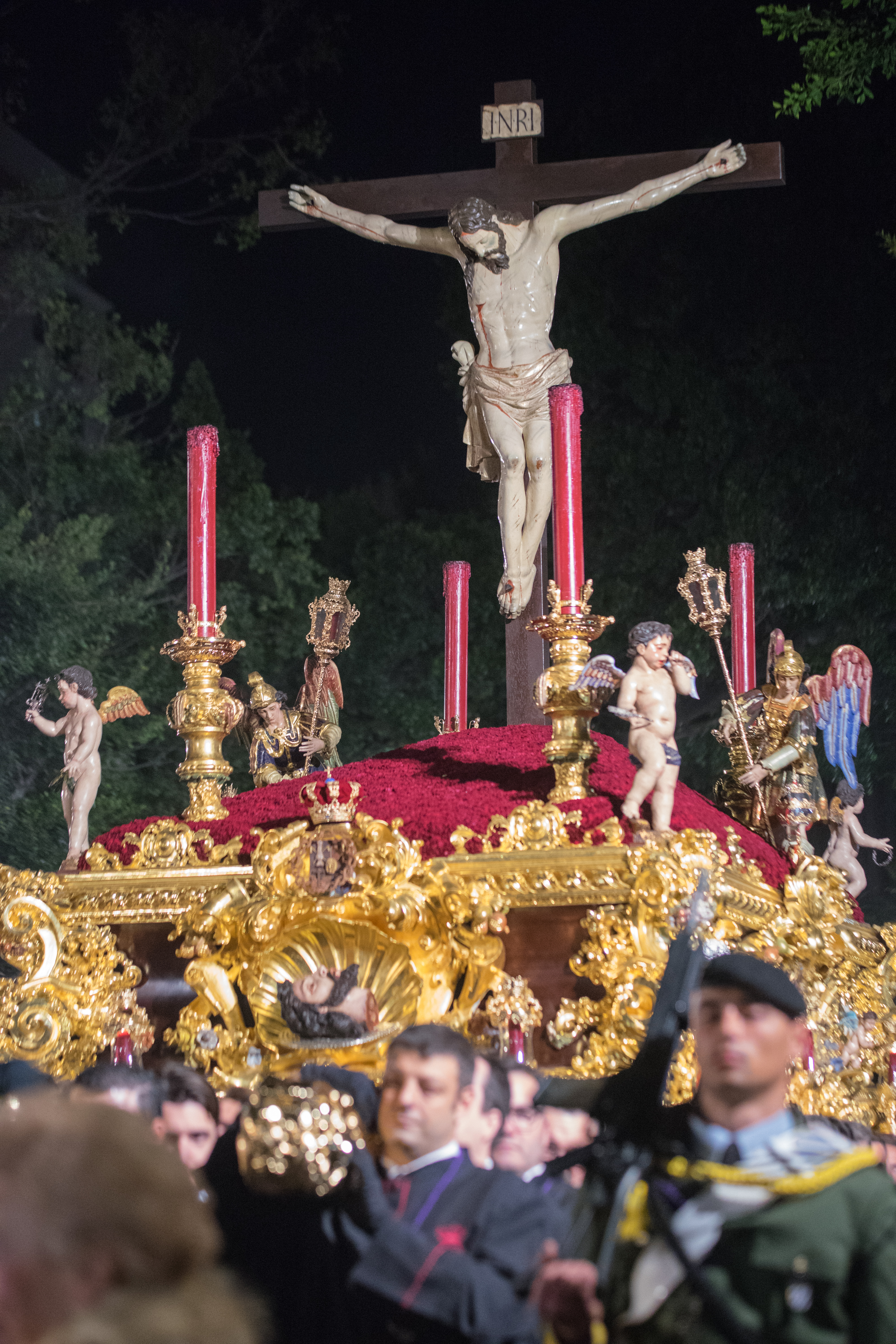 Primitiva Hermandad Sacramental y Reales Cofradías Fusionadas de Ntro. Padre Jesús de Azotes y Columna, Stmo. Cristo de la Exaltación, Stmo. Cristo de Ánimas de Ciegos, María Santísima de Lágrimas y Favores, e Ilustre Archicofradía de la Santa Vera+Cruz y Sangre, Ntra. Sra. del Mayor Dolor y San Juan Evangelista This is a photography of a Folklore festival in Spain (Wikidata id Q9075883).